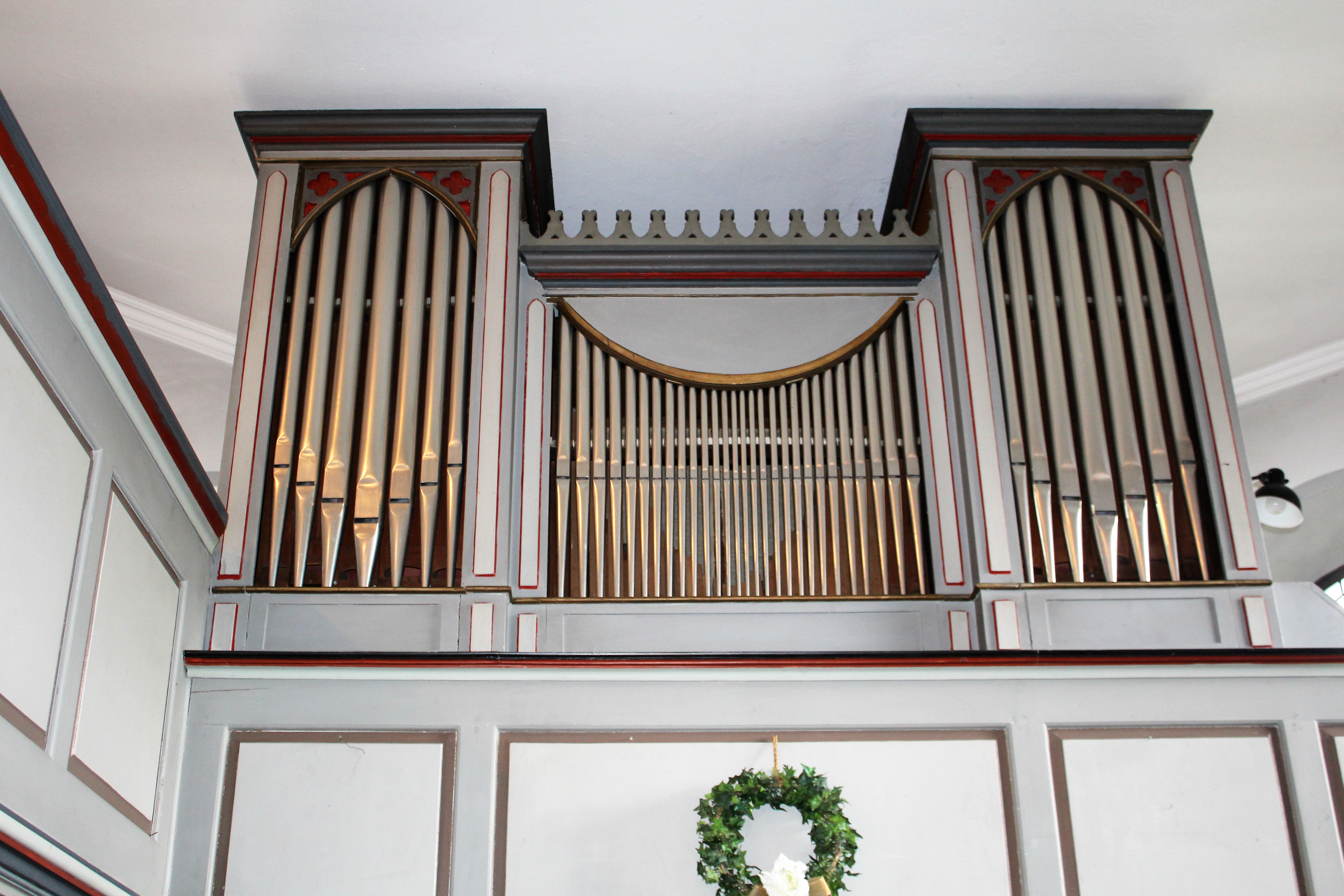 Evangelische Kirche Klein-Rechtenbach, Gemeinde Hüttenberg, Lahn-Dill-Kreis, Hessen, Deutschland